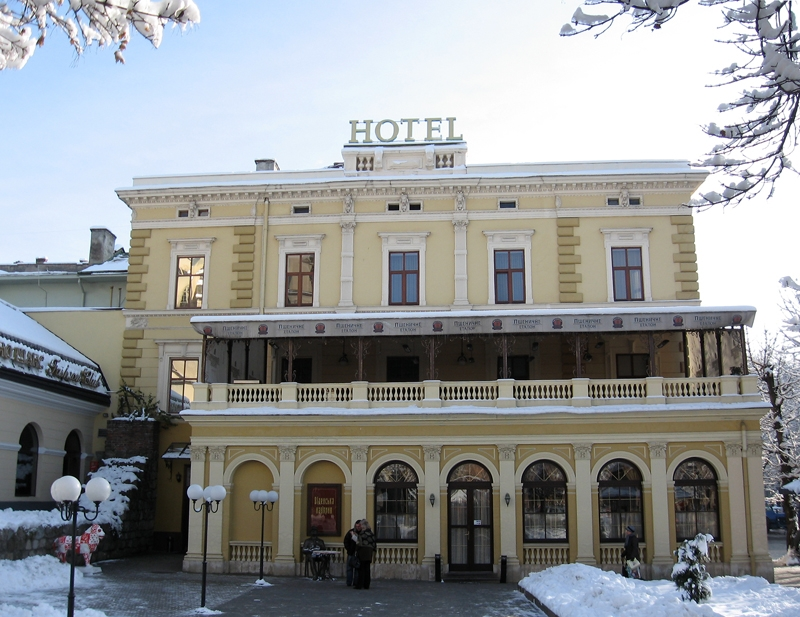 Венская кофейня во Львове. В 2005 году в здании была размещена гостиница «Вена».